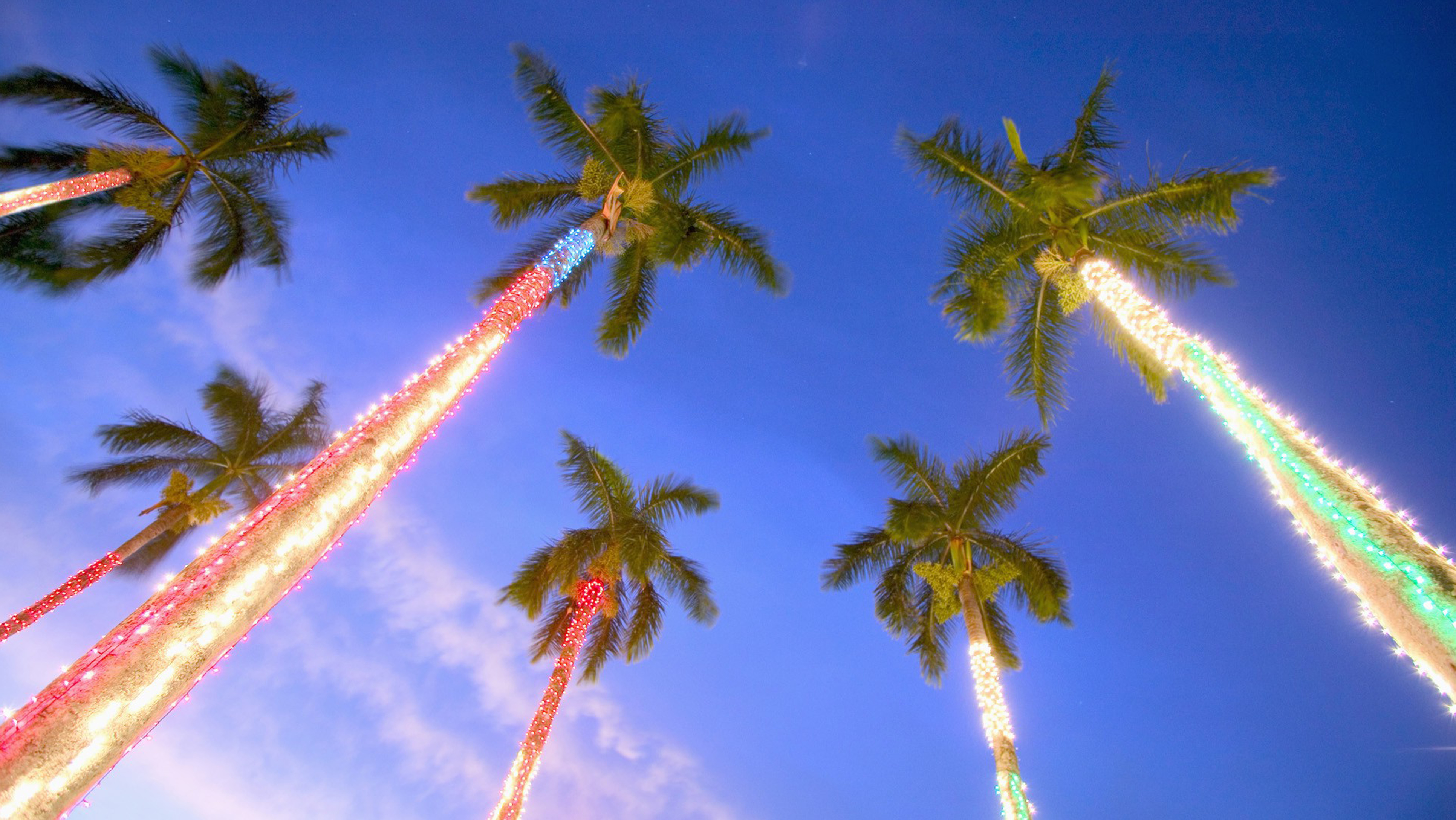 Palmas en Navidad, Boquerón.